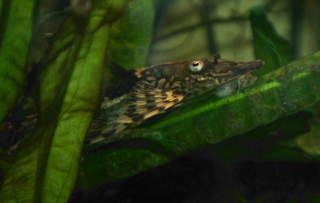 GNU-FDL, Sturisomatichthys leightoni - Zwergstörwels - Foto selbst gemacht